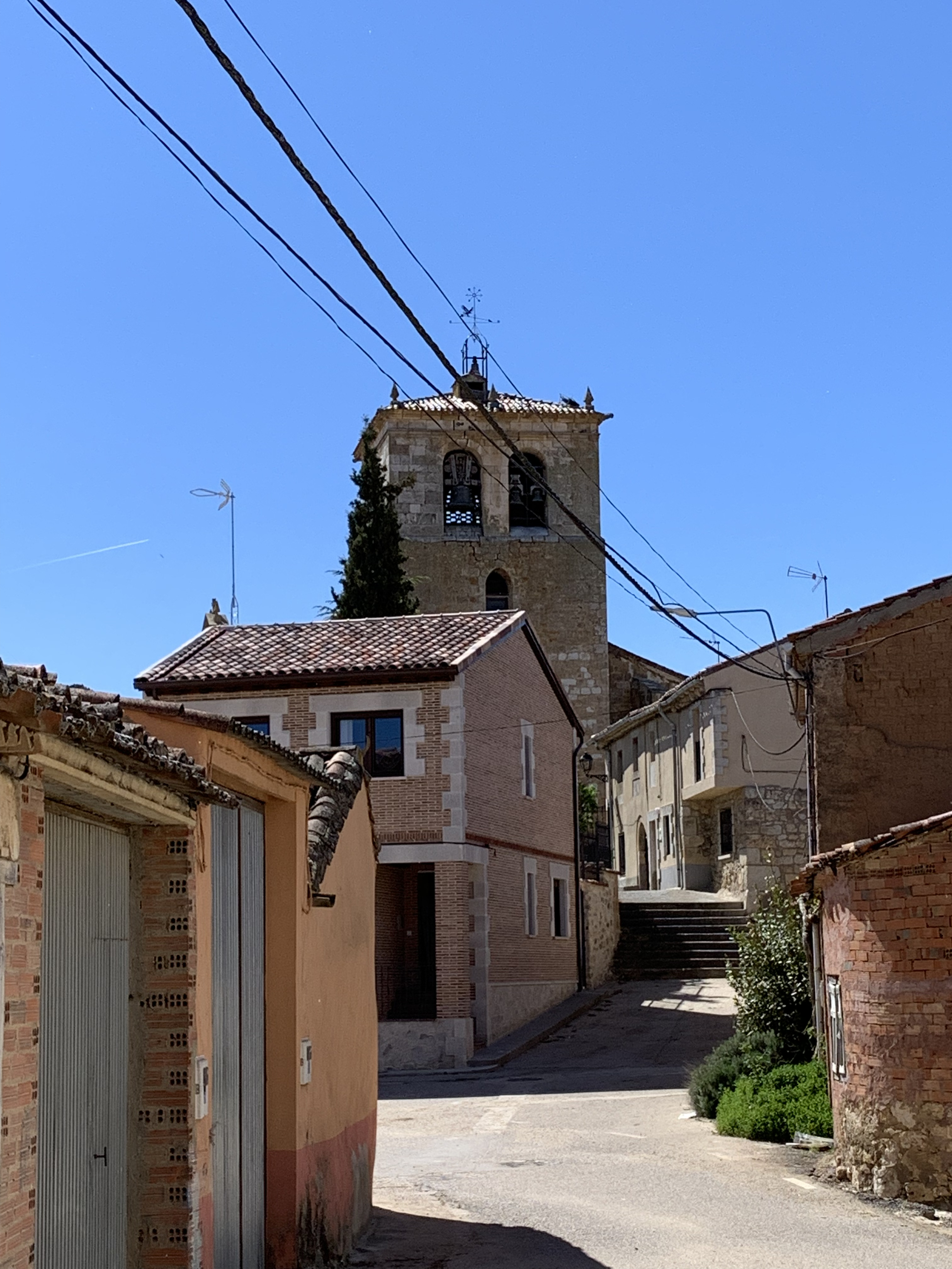 Pinilla Trasmonte